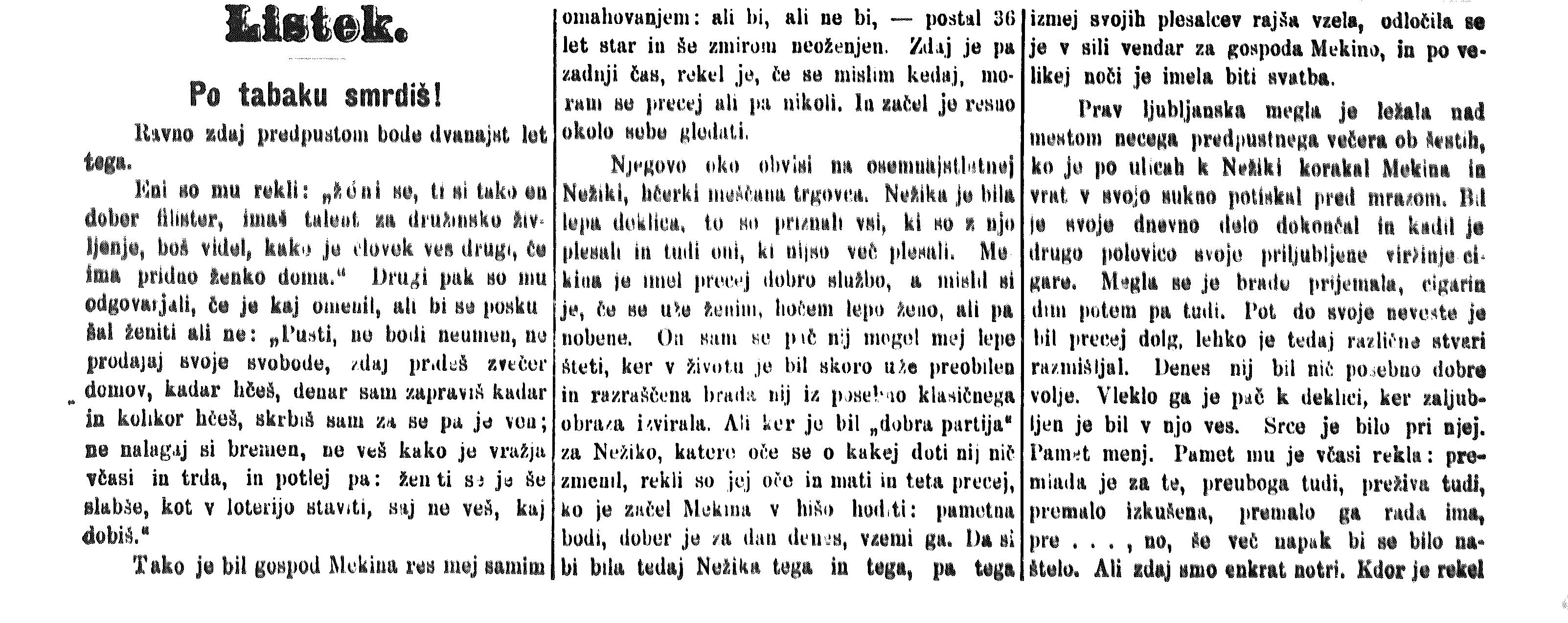 Začetek besedila Josipa Jurčiča Po tobaku smrdiš iz časopisa Slovenski narod.